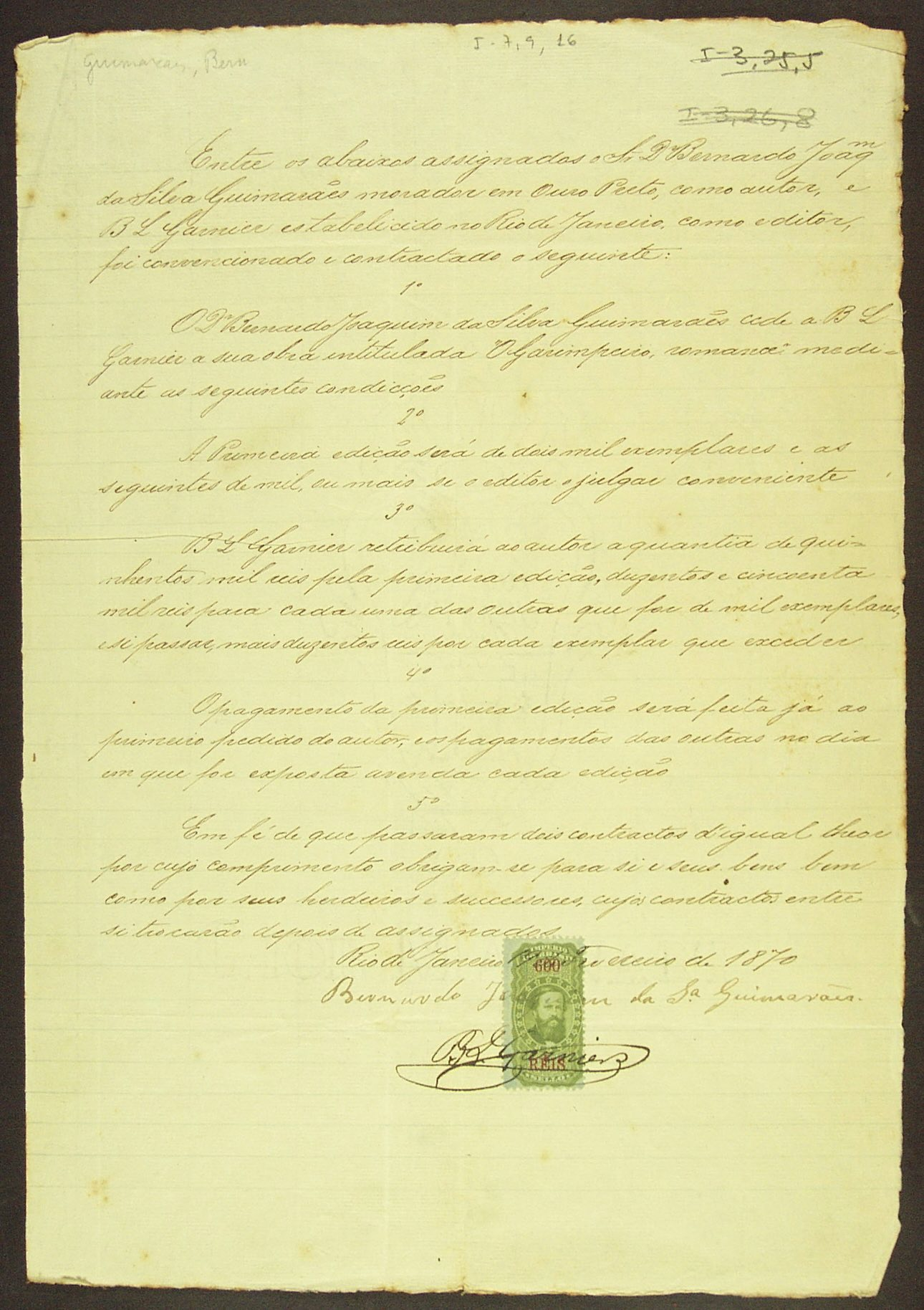 Contrato entre o escritor brasileiro Bernardo Guimarães e a editora B. L. Garnier para publicação do livro O Garimpeiro